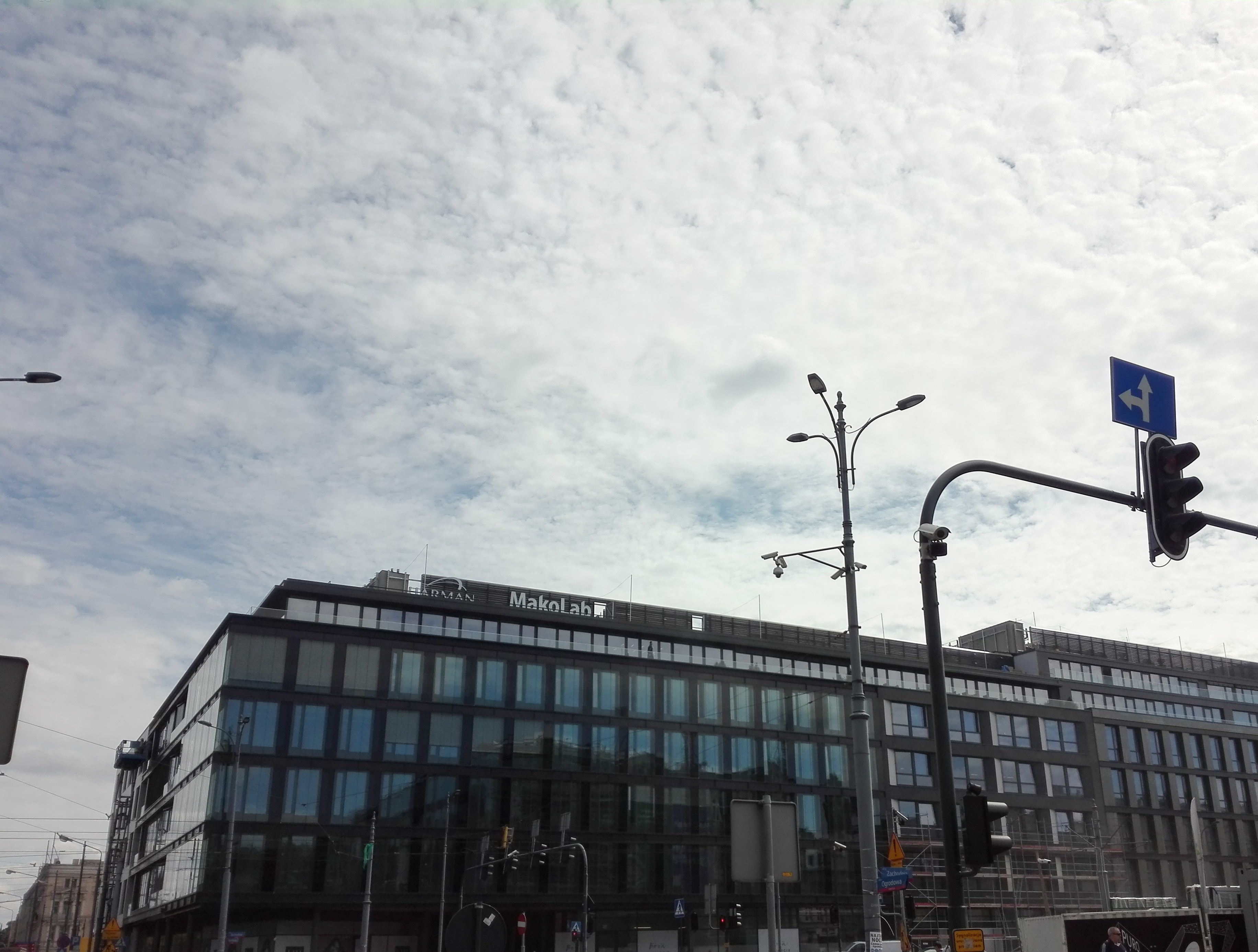 Biuro MakoLab S.A. przy ulicy Ogrodowej 8 w Łodzi.